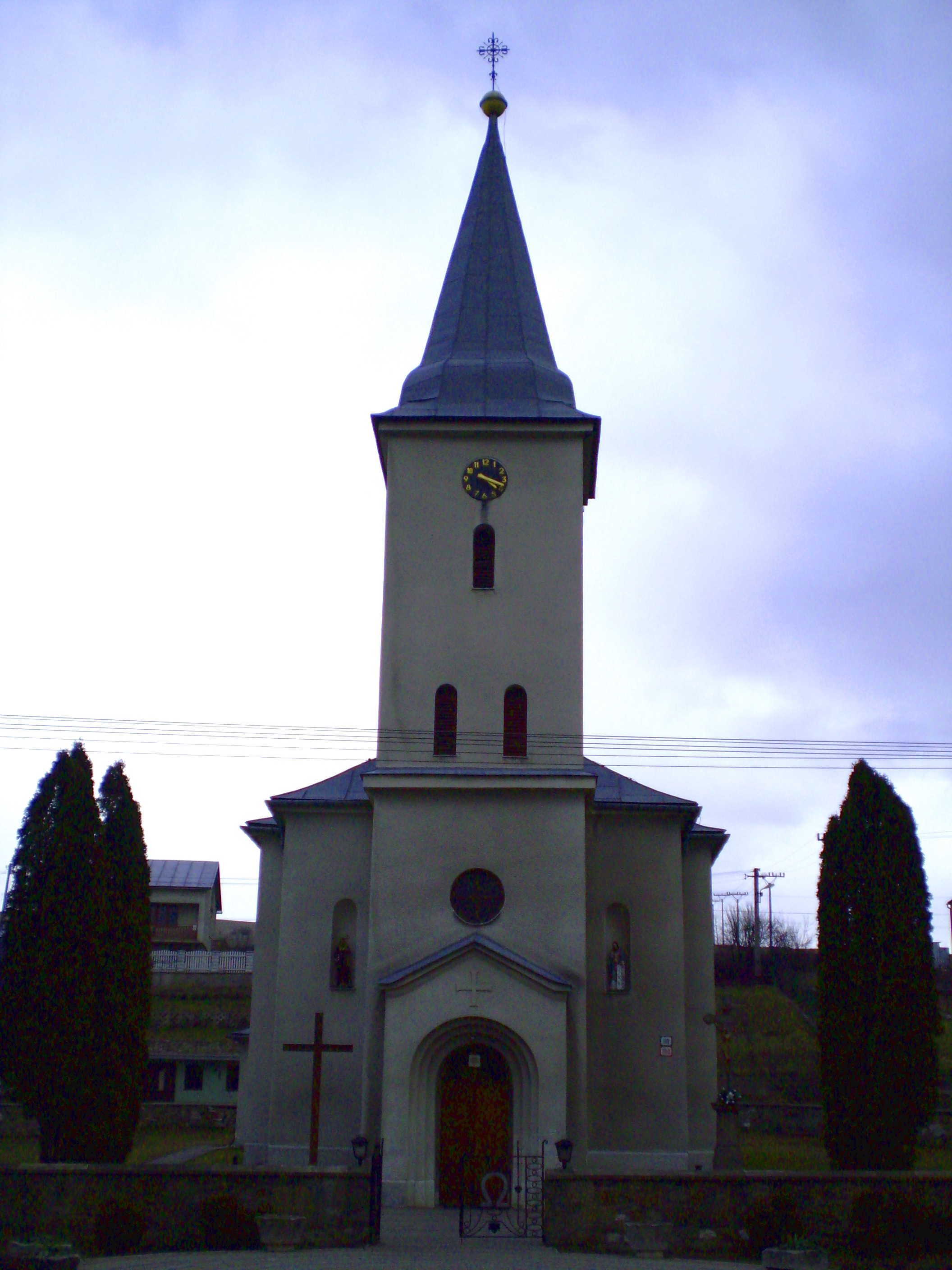 Kostol Mena Panny Marie v Lubotine